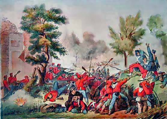 Battaglia del Volturno - combattimento di Porta Romana, verso Santa Maria Maggiore (1860).